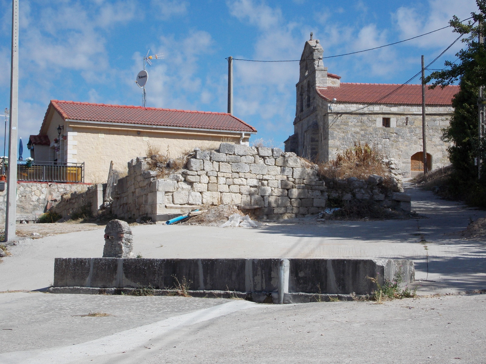 Hormazuela. España. Plaza, fuente y abrevadero. La iglesia de San Pantaleón al fondo a la derecha.